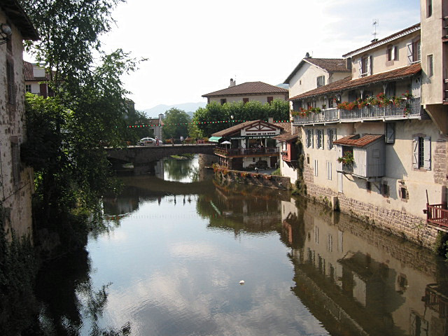 Saint-Jean-Pied-de-Port, la Nive de Béhérobie. Photo prise le 04/07/04 par Harrieta171